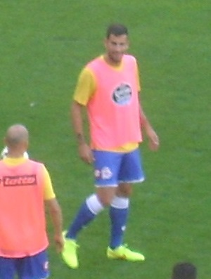 Alberto Lopo